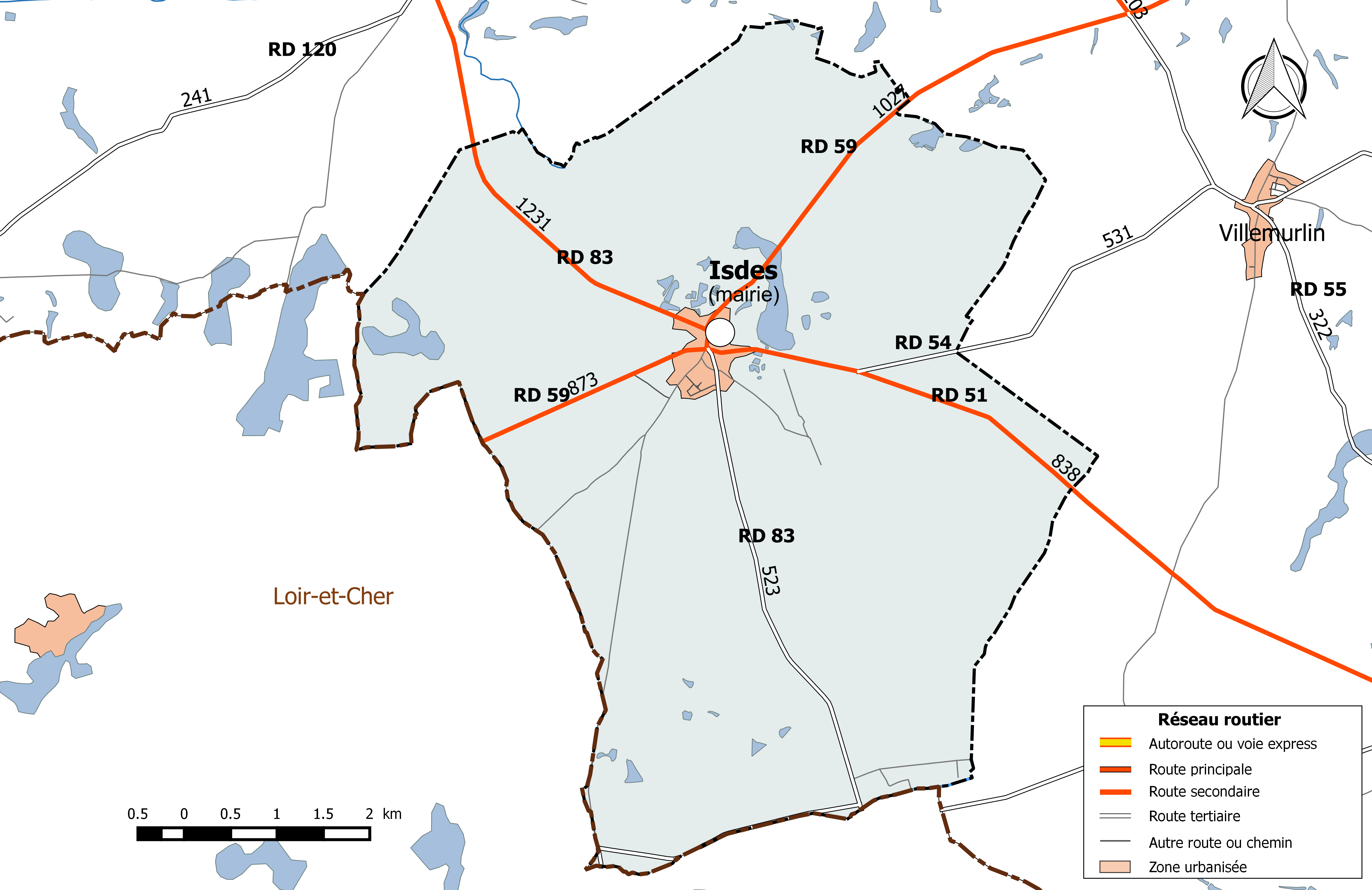 Carte du réseau routier de la commune de Isdes.